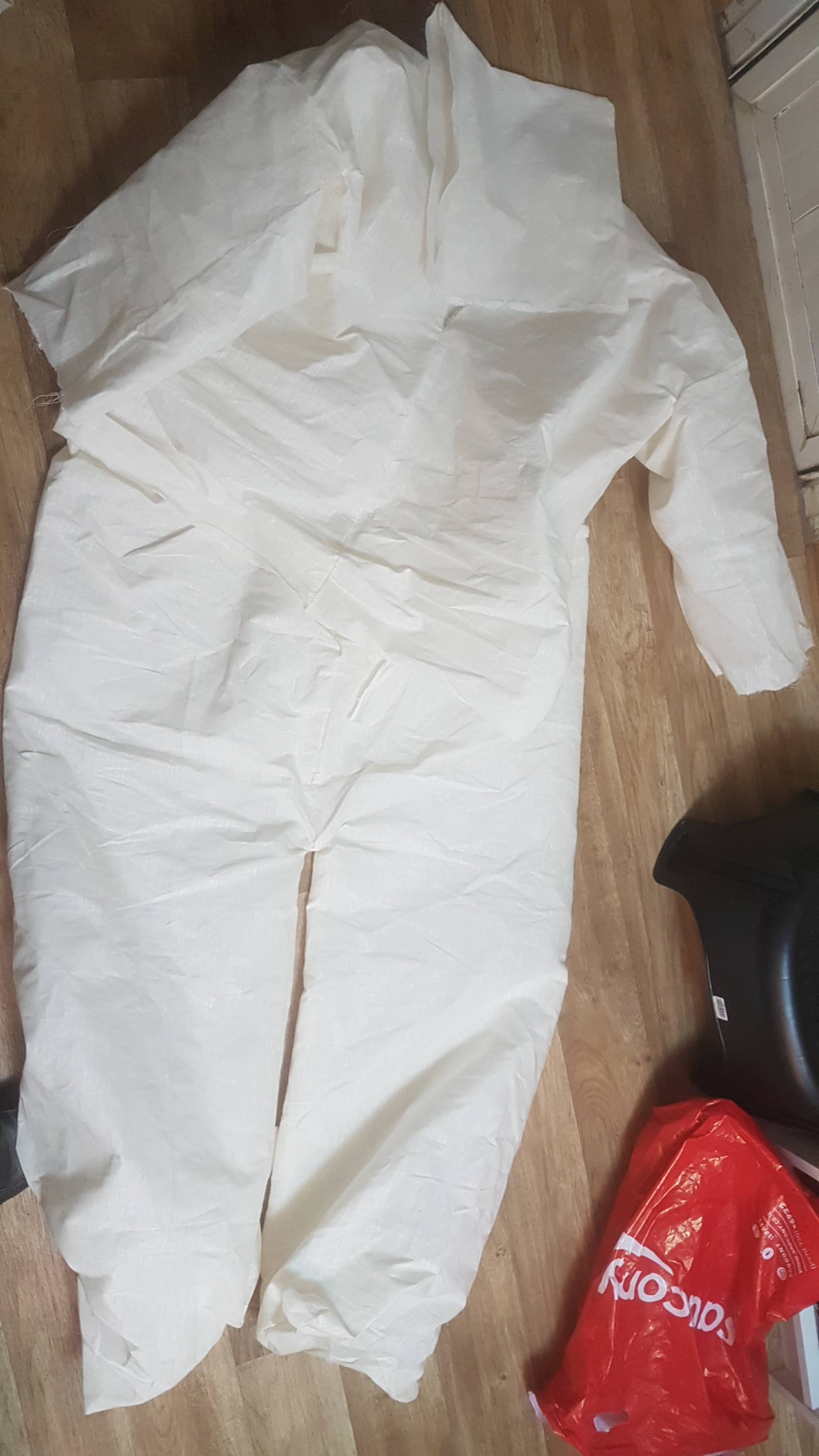 תכריכי נפטר רואים את המכנס חולצה והבגד ששמים על הפנים.